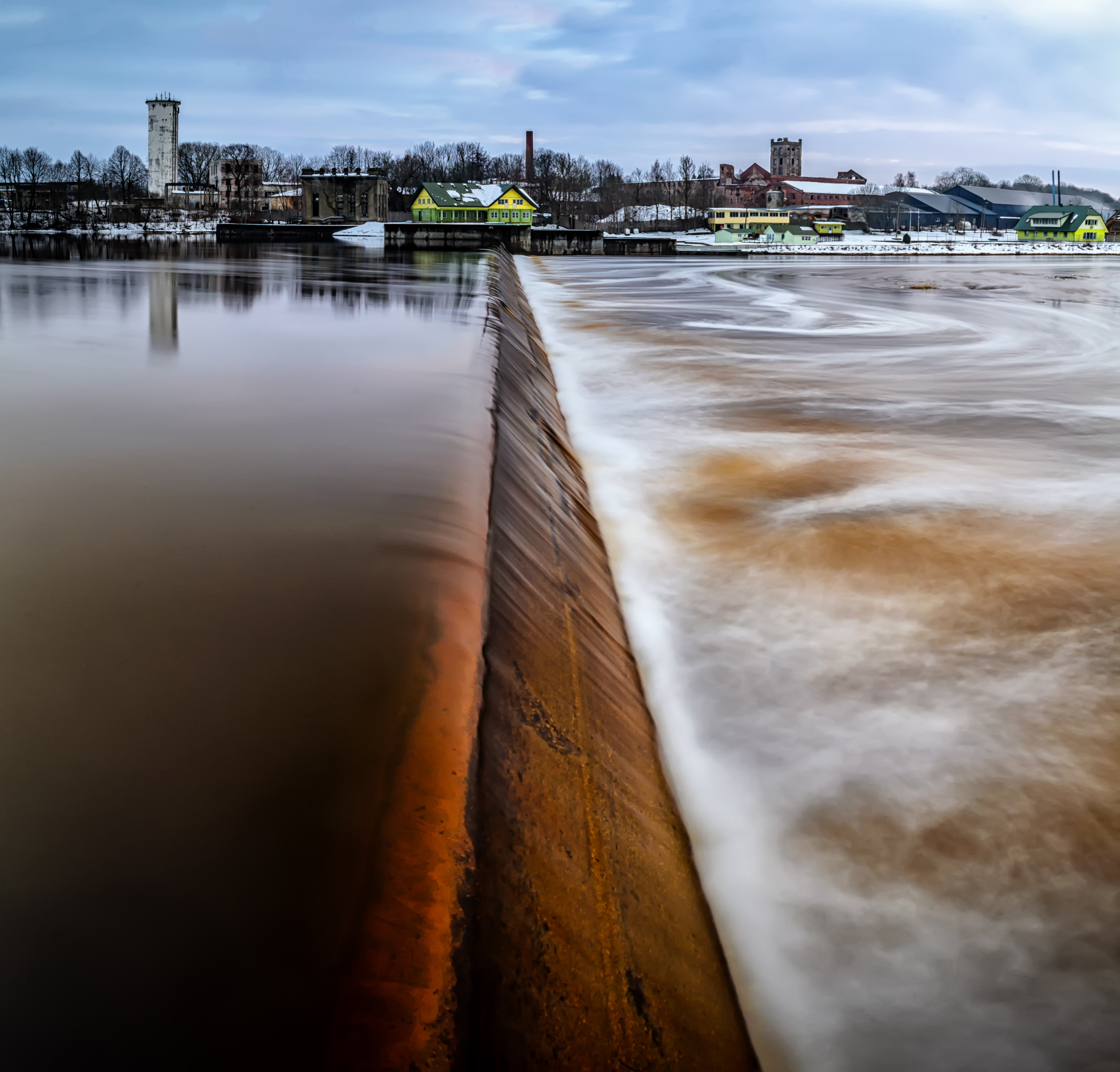 Sindi pais